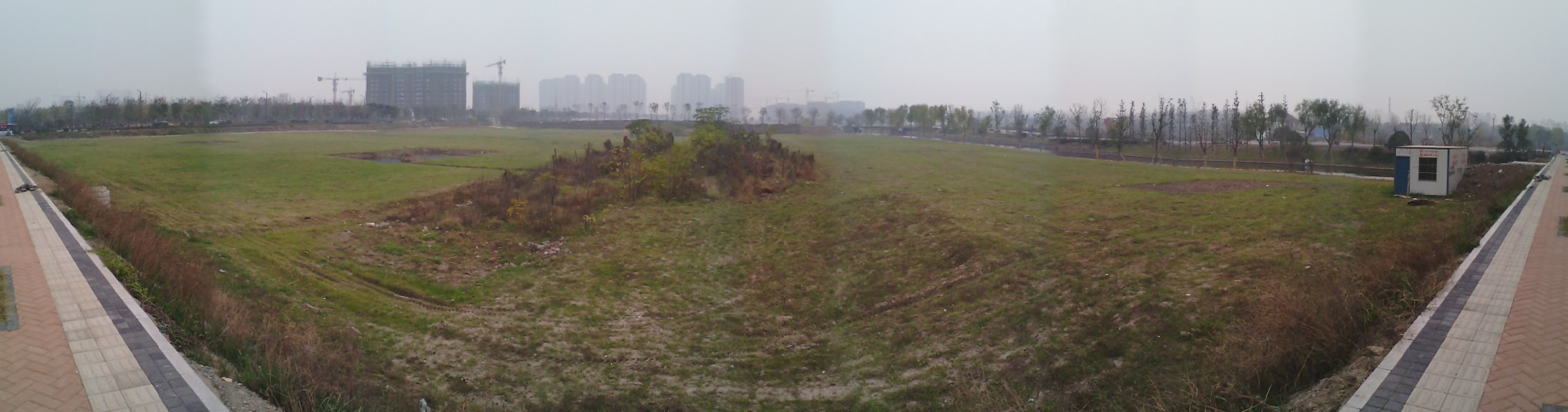 南京市江心洲全景